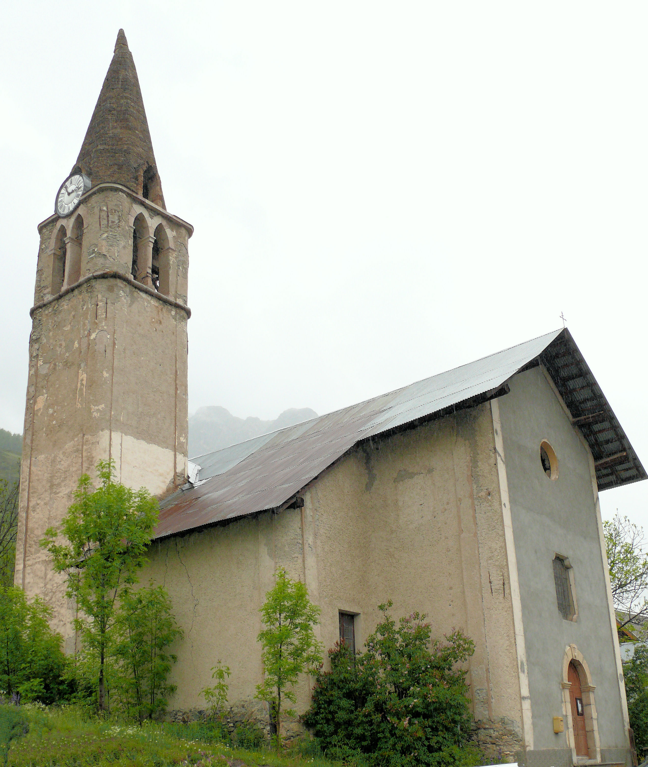 Saint-Paul-sur-Ubaye - Eglise du village de Serennes